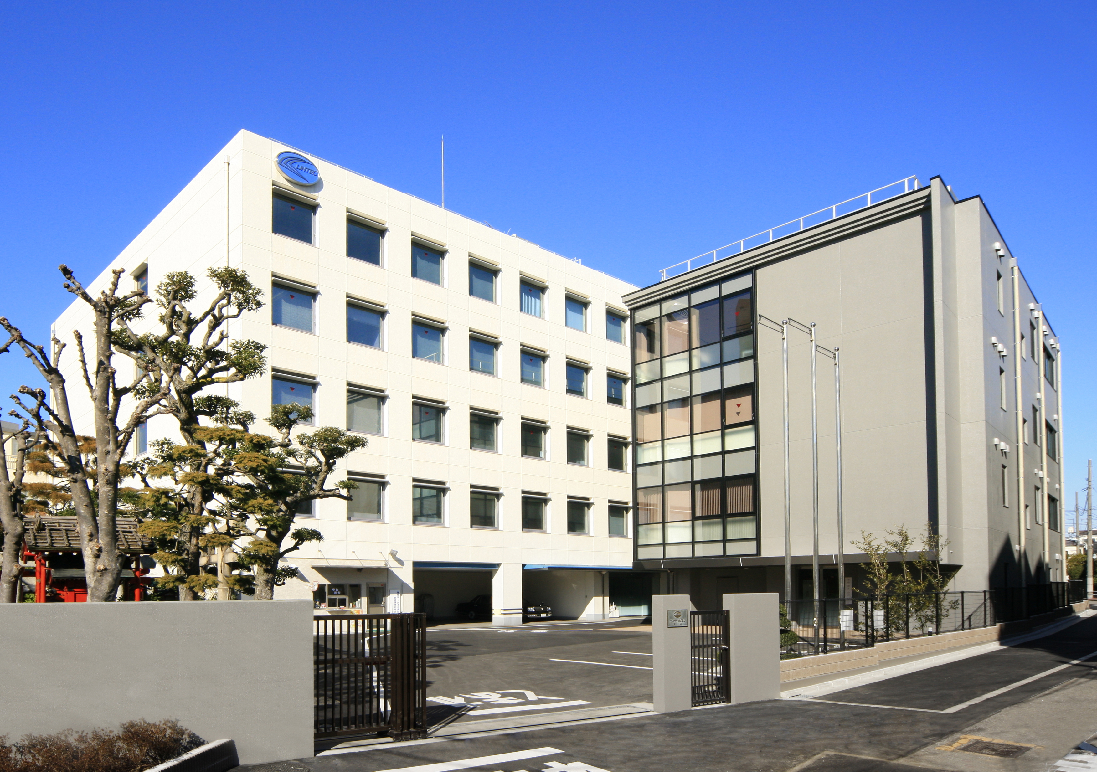 Lintec 本社